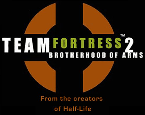 Logo of the never released version of Team Fortress 2